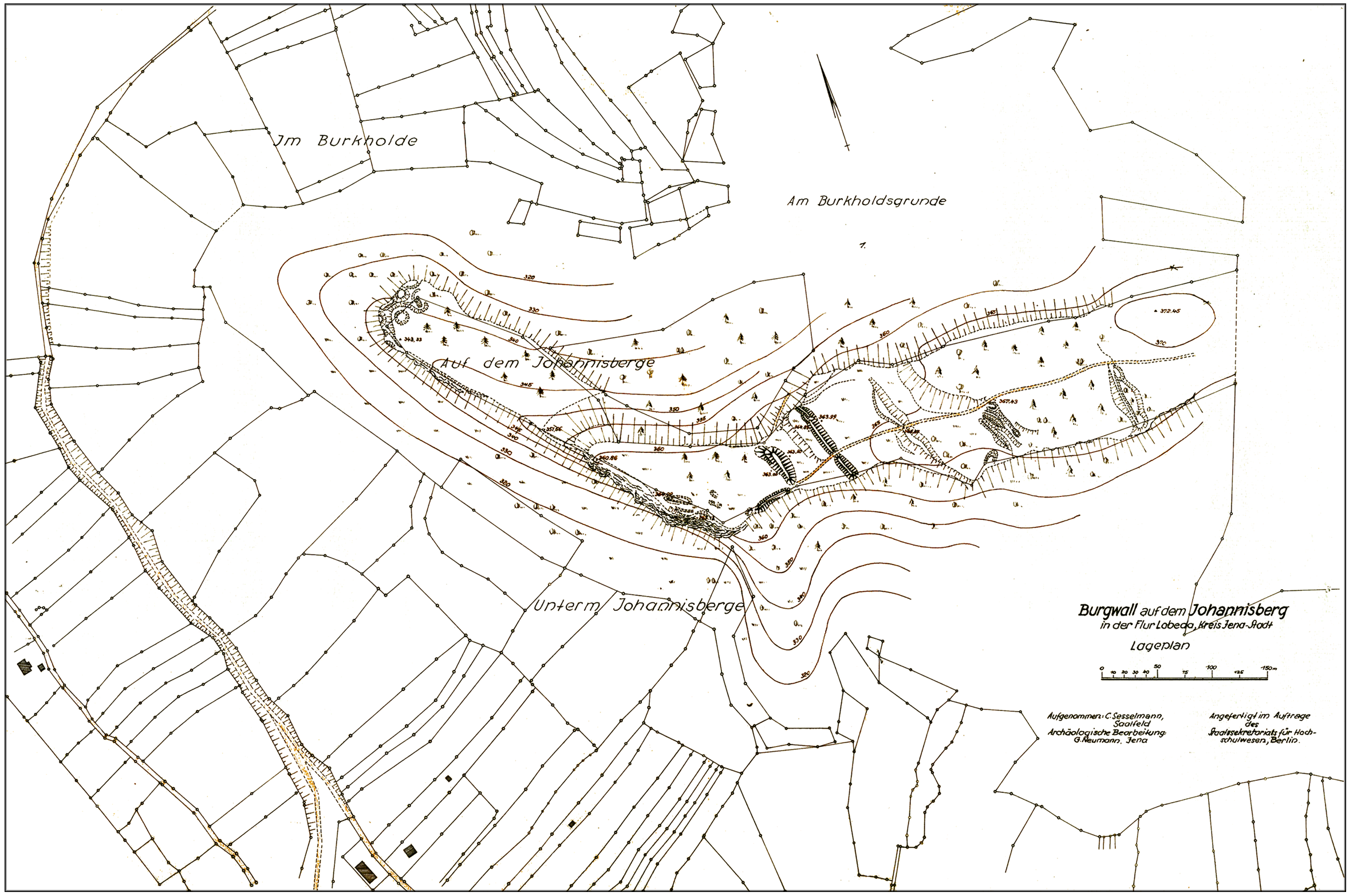 Jena-Lobeda, Johannisberg. Plan nach der Vermessung von Curt Sesselmann 1957.